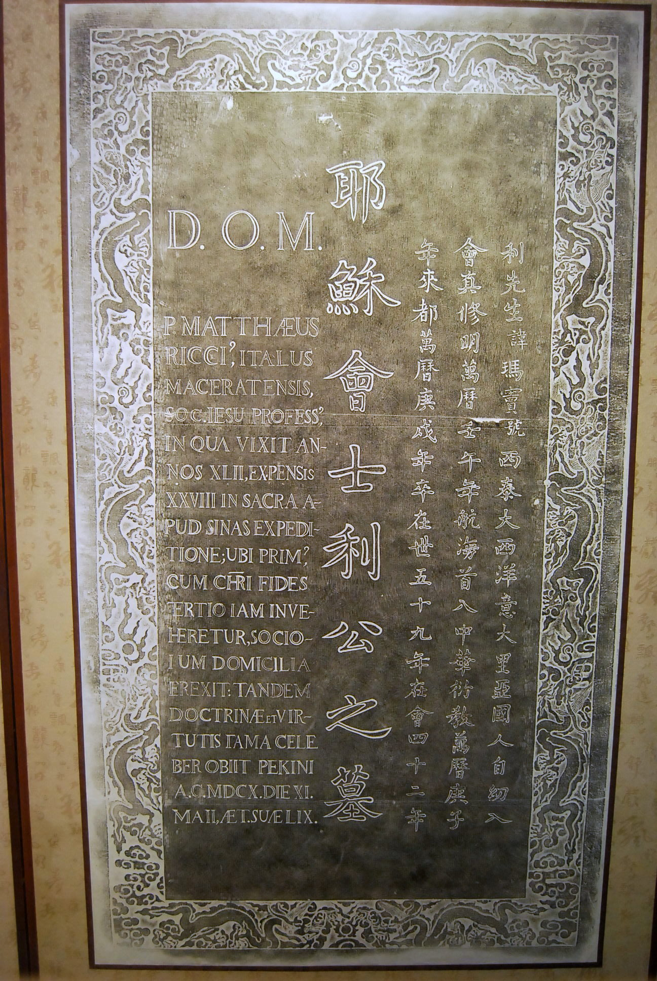 利玛窦墓碑拓片